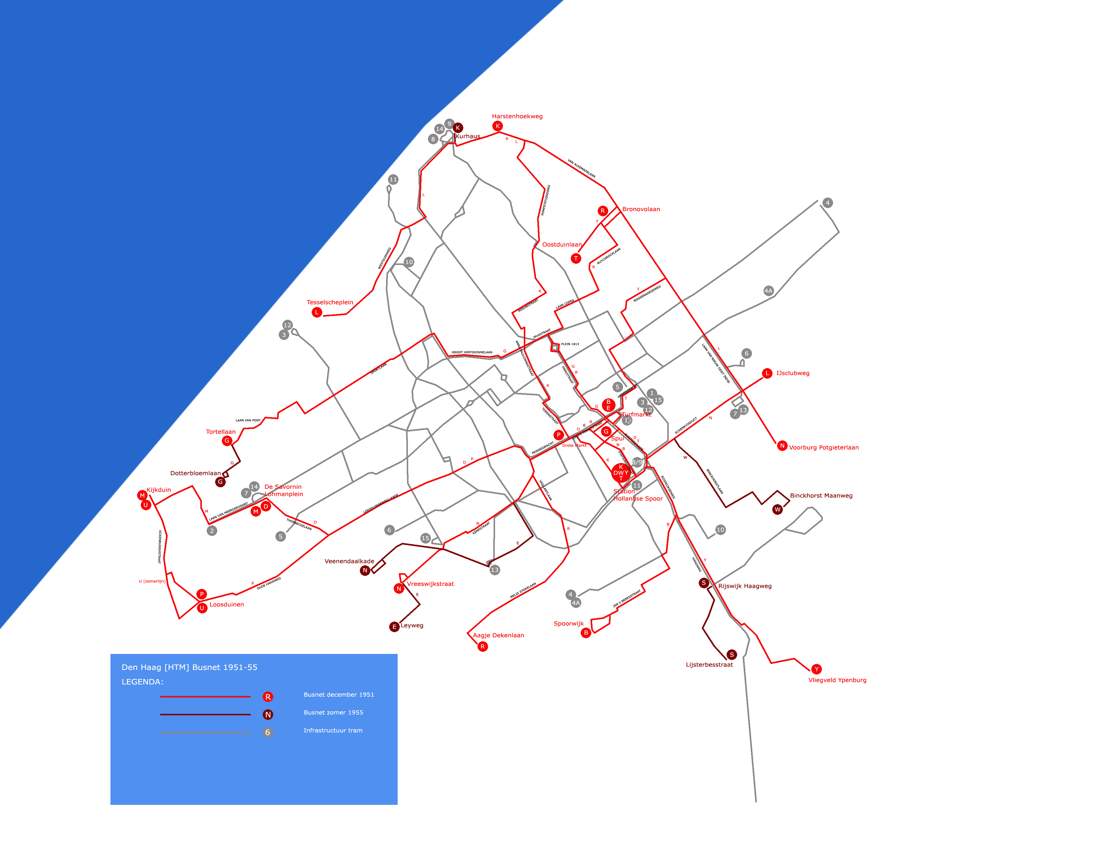 Busnet HTM 1951/5